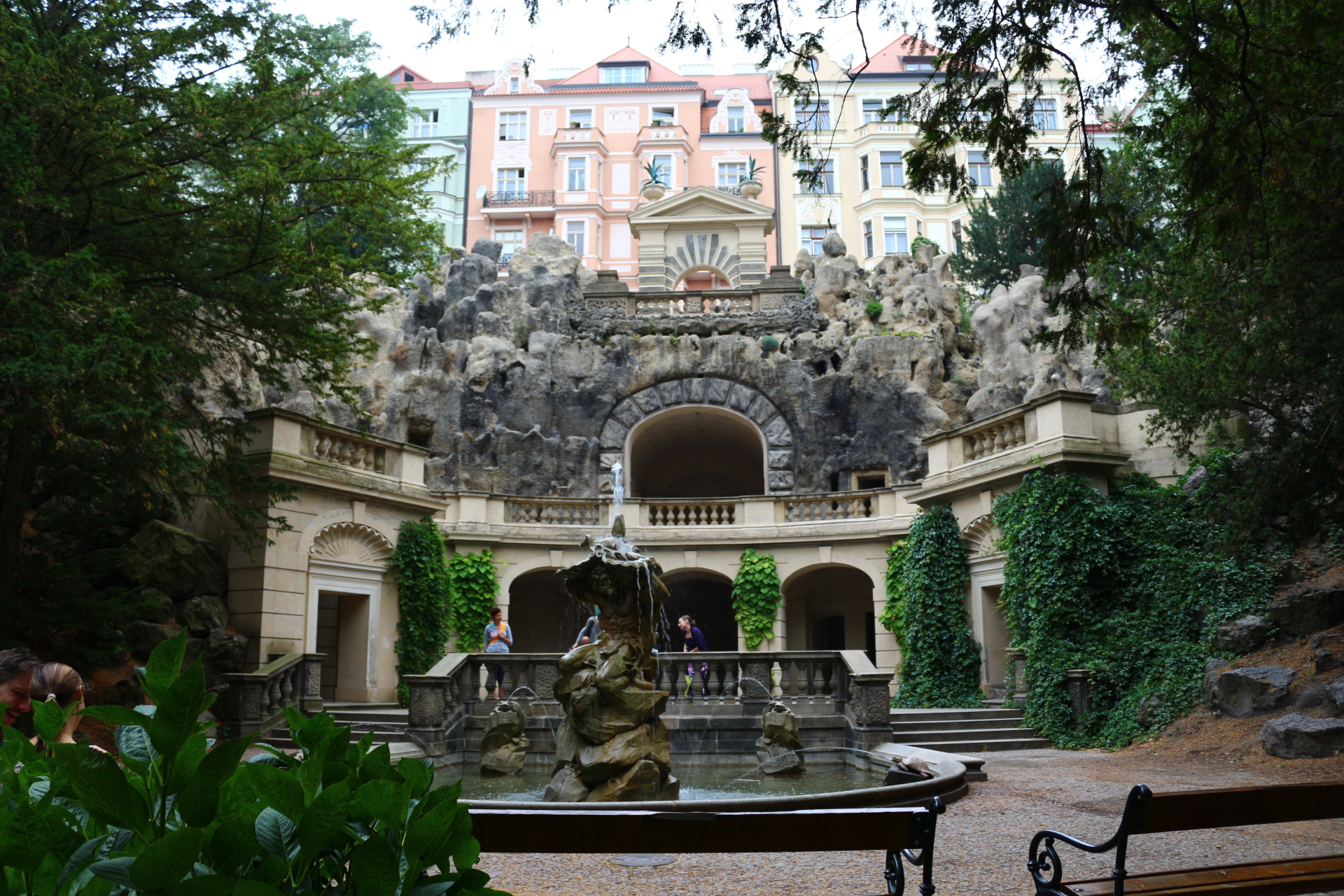 Fontána v grottě Havlíčkových sadů v Praze